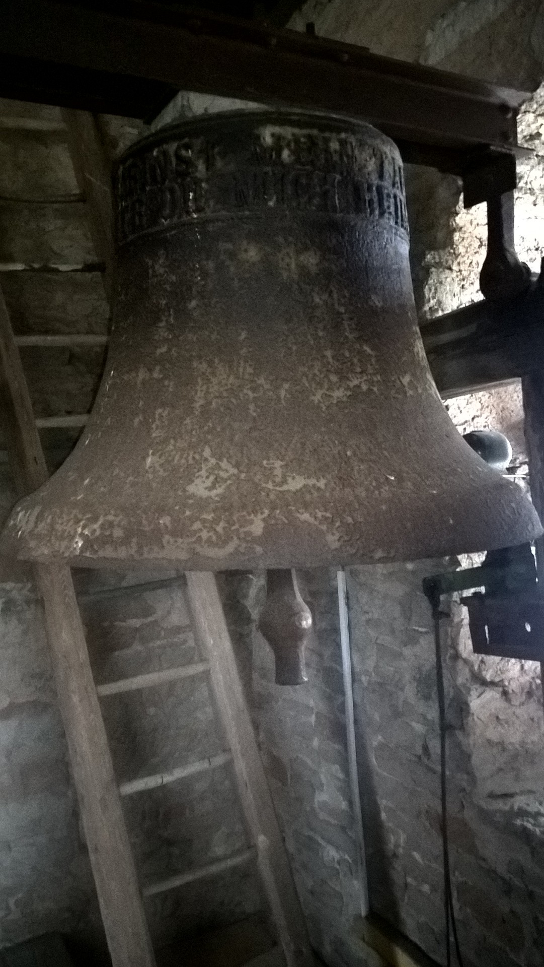 Kleine Glocke der Evangelischen Kirche St. Gotthardt, Rohnstedt, Großenehrich, Thüringen, Deutschland